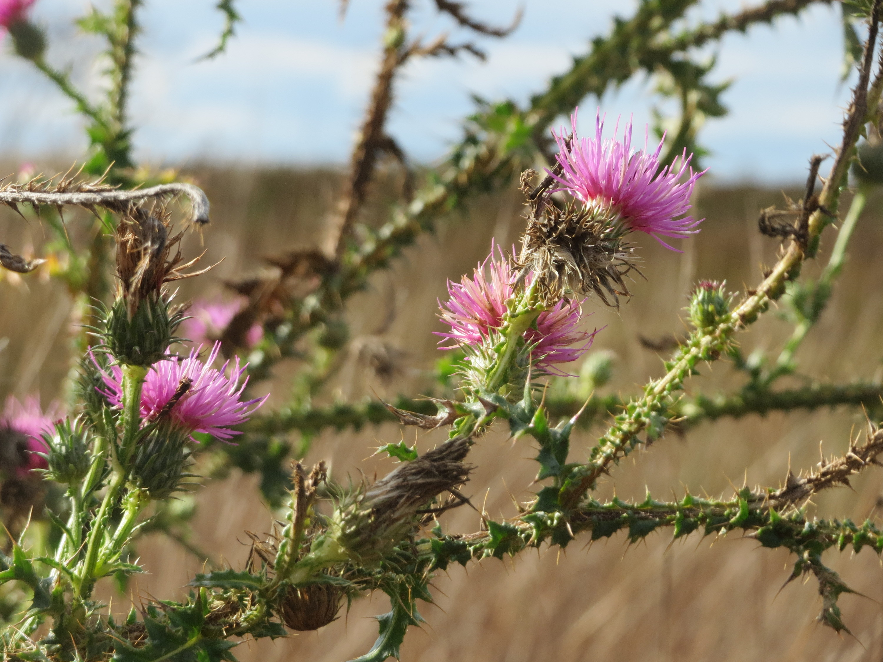 Weg-Distel (Carduus acanthoides) im Hockenheimer Rheinbogen